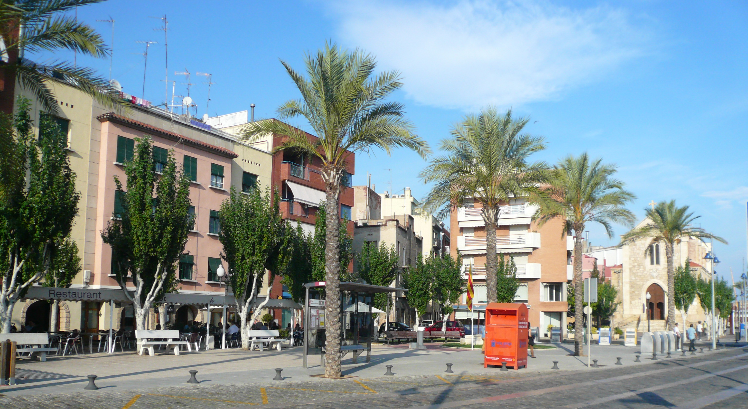 Plaça del Bisbe Bonet, al Serrallo, encarada al port de Tarragona i amb l'església de Sant Pere, patró dels pescadors, a la dreta.